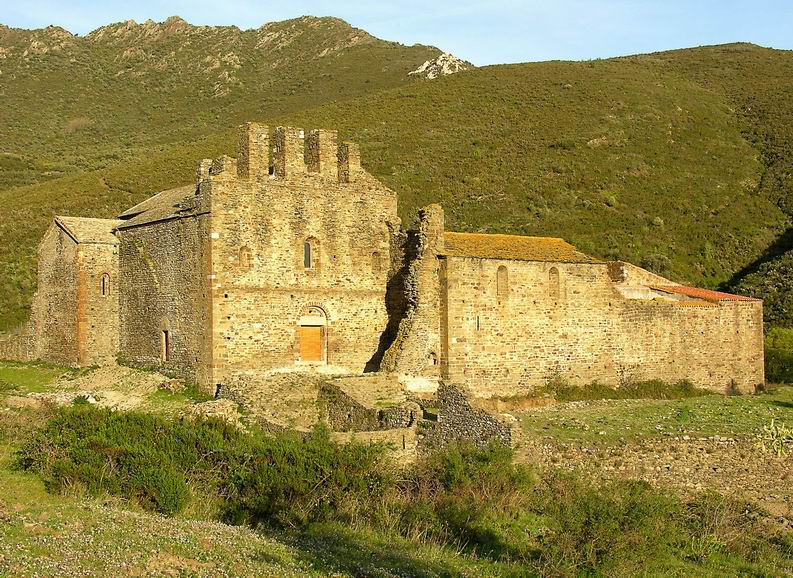 Costat nord-occidental del monestir de Sant Quirze de Colera